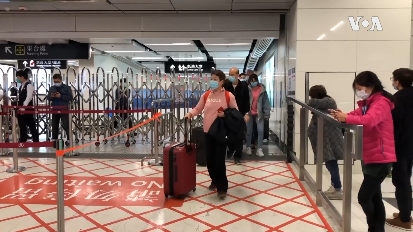 香港高铁站封关在即 港人蜂拥从中国大陆返回